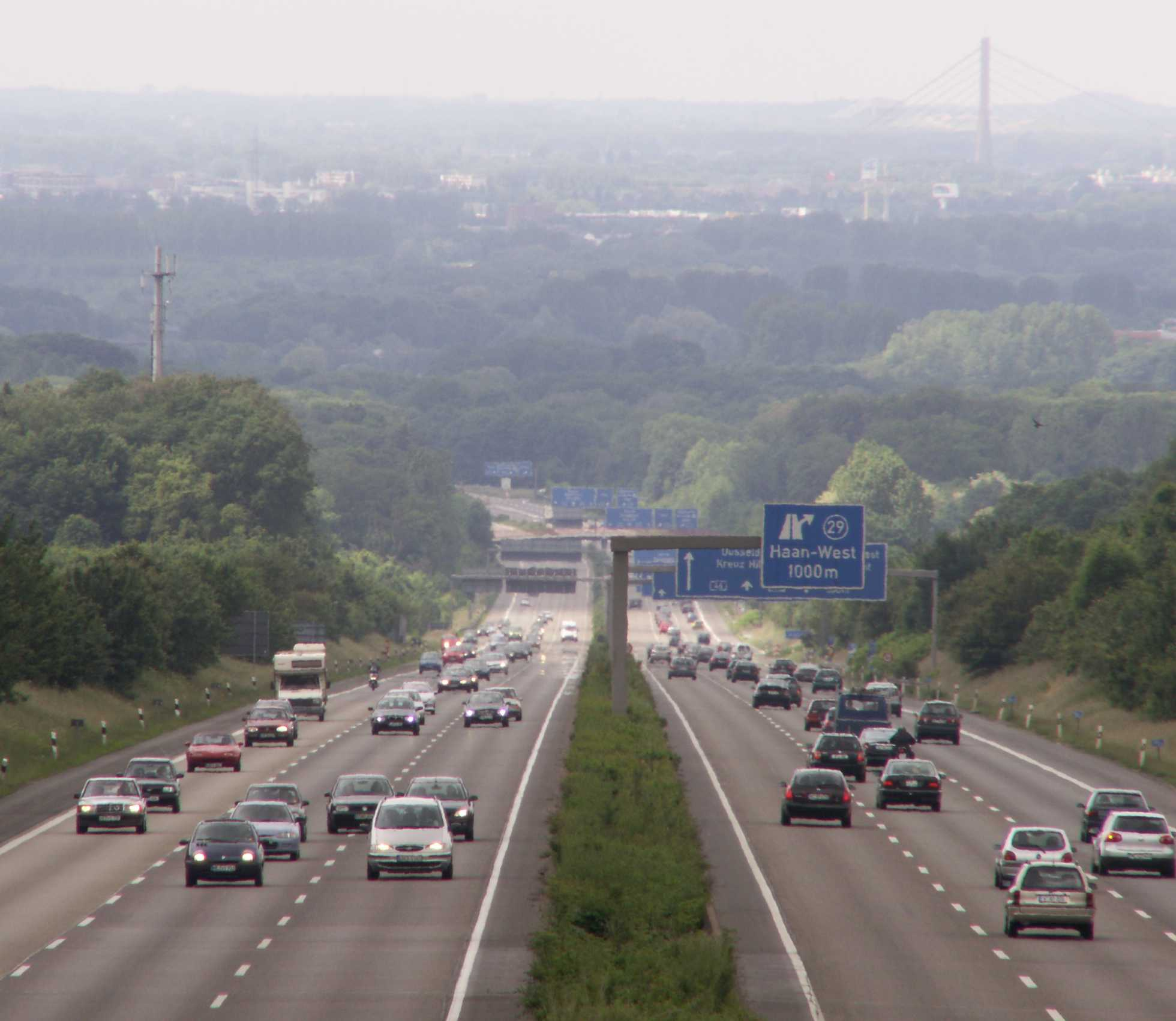 Blick nach Westen auf die A46 zwischen Haan/Ost und Haan/Hochdahl am Abstieg vom Niederbergischen Land in die niederrheinische Tiefebene. Im Hintergrund rechts die Fleher Brücke über den Rhein.